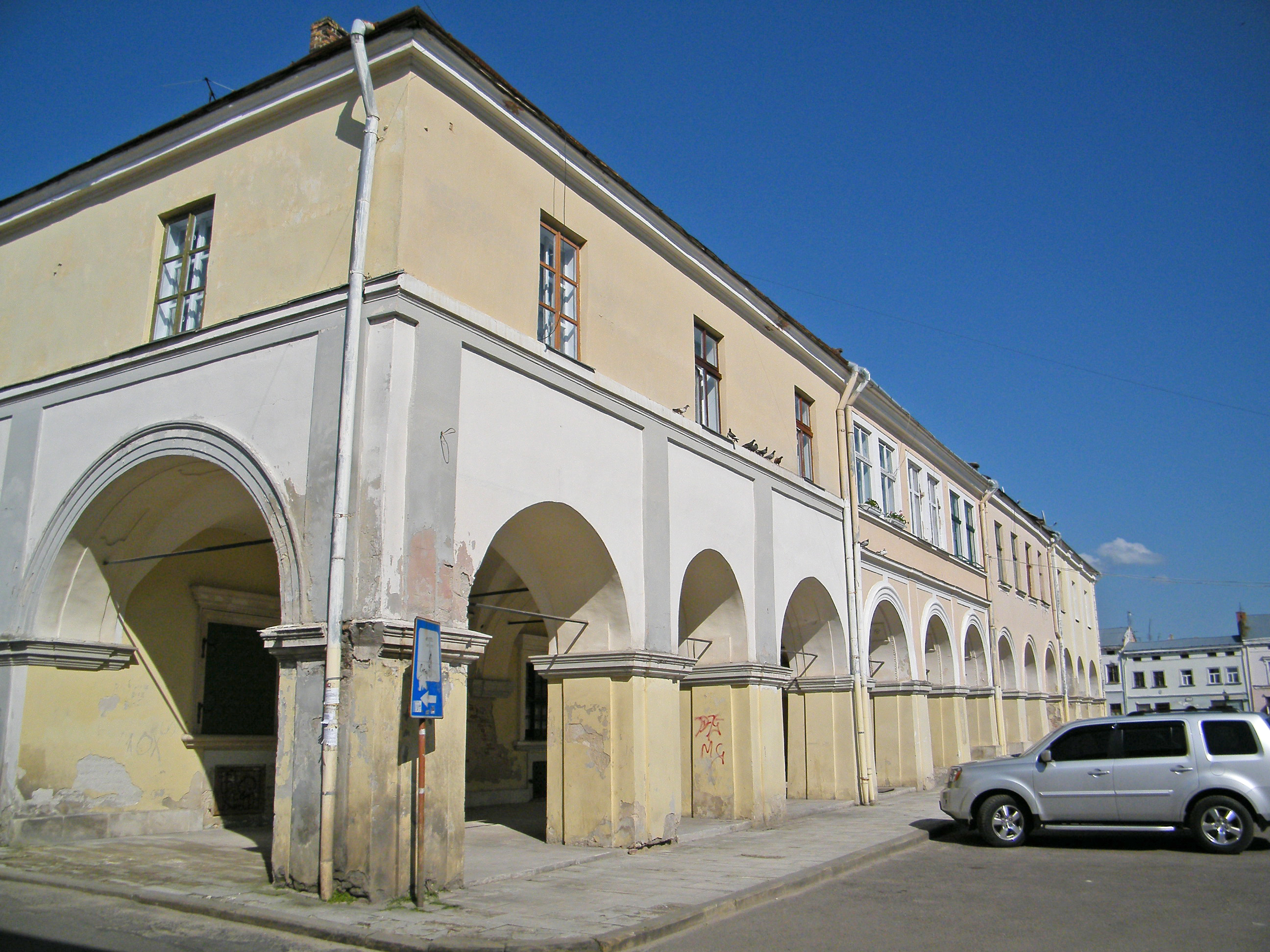 Центр города